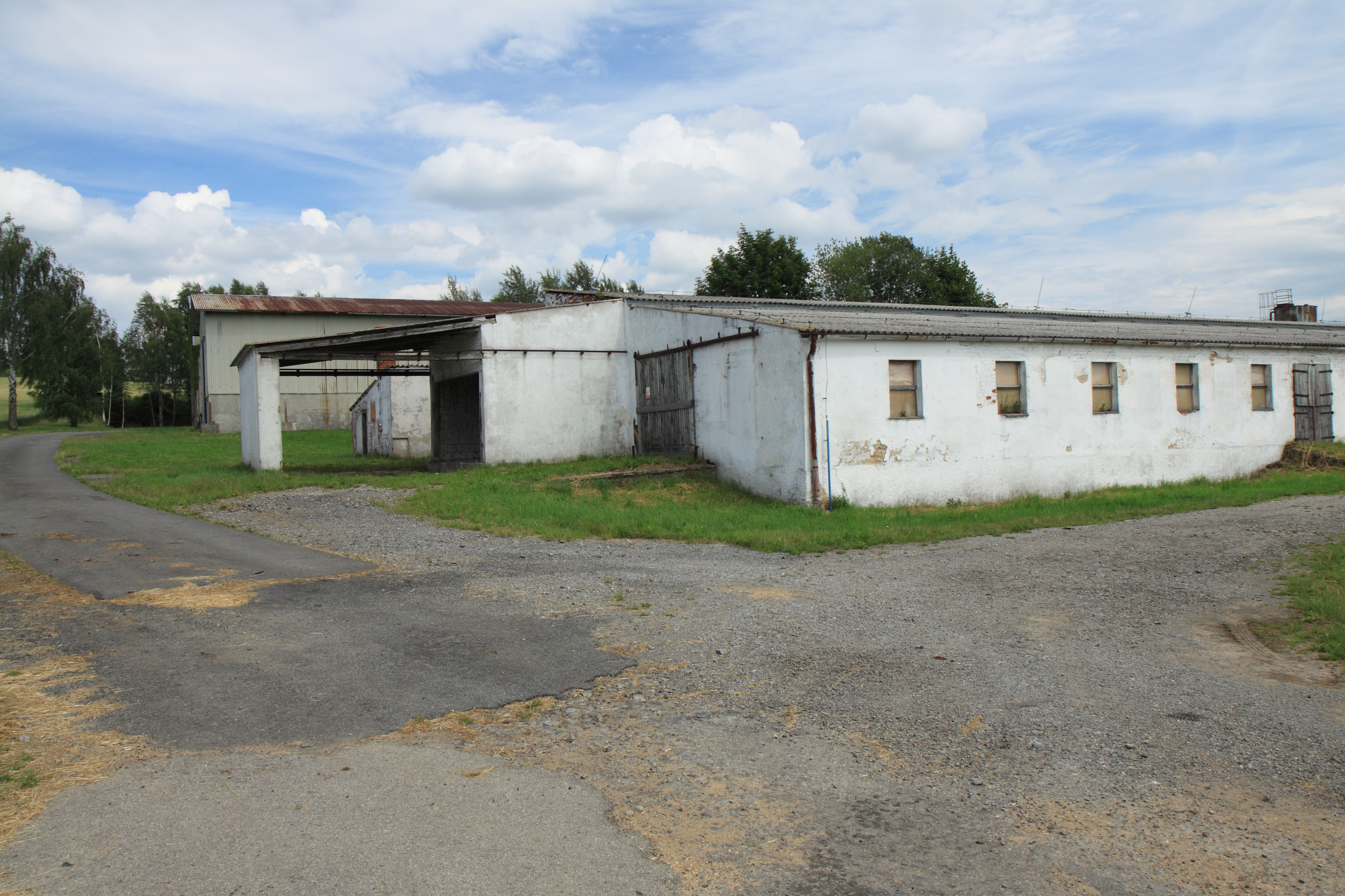 Budovy zemědělského družstva v Pojbukách